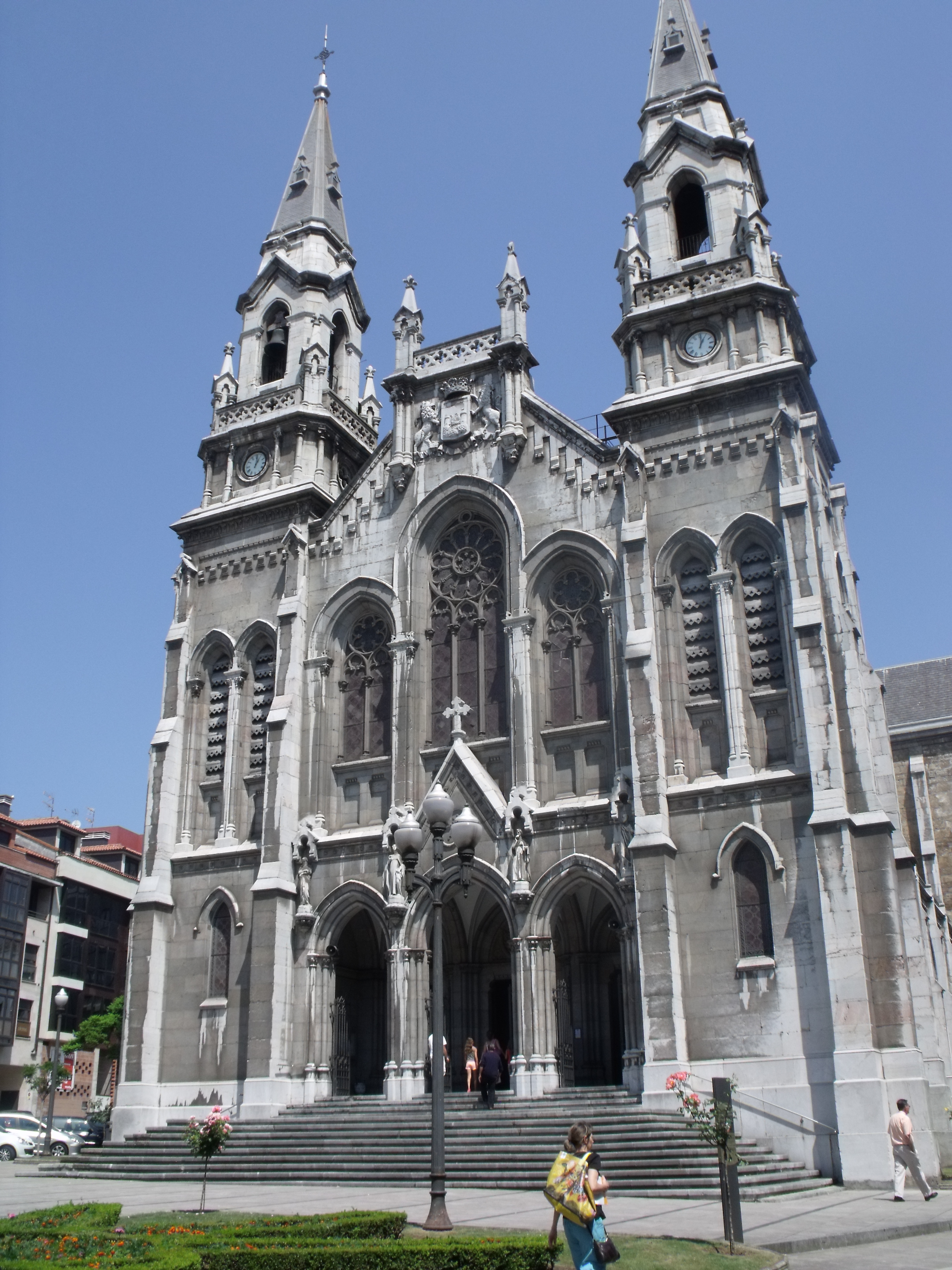 Iglesia de Santo Tomás de Canterbury. Aviles, Asturias.